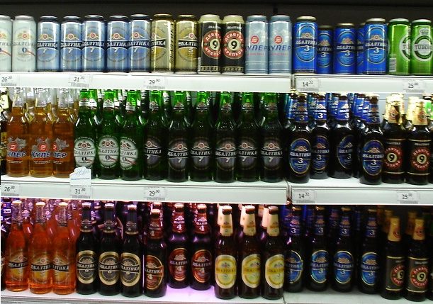 Varieties of Baltika Beer (from left to right): Cans (top row): Baltika 0, Baltika 7, Baltika 5, "9", Baltika Cooler, Baltika 3, Tuborg; Bottles (middle row): Baltika Cooler, Baltika 0, Baltika 7, Baltika 3, "9"; Bottles (bottom row): Baltika 5, Baltika 6, Baltika 4, Baltika 8, Baltika 3, "9"